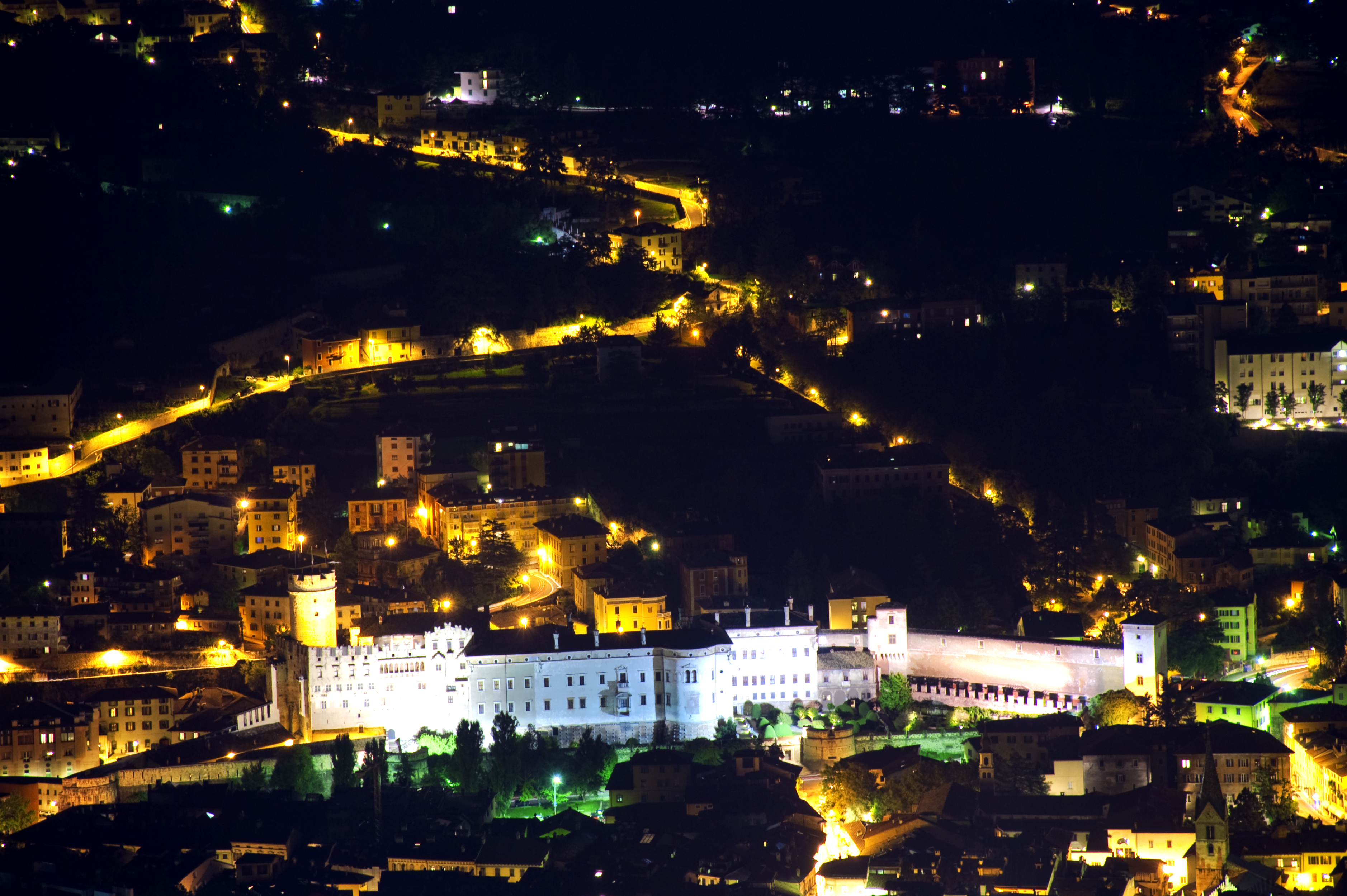 Trento, castello buonconsiglio,notte